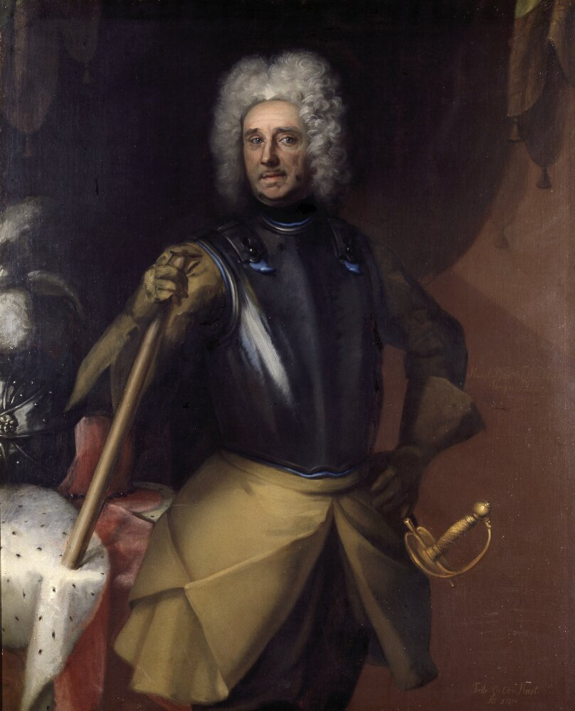 Porträtt av Carl Mörner af Morlanda (1658-1721) iklädd harnesk och älghudskyller. I handen håller han en fältmarskalksstav. På bordet syns en riksrådsmantel samt en hjälm. I nedre högra hörnet står att tavlan målats av David von Krafft samt årtalet 1709.